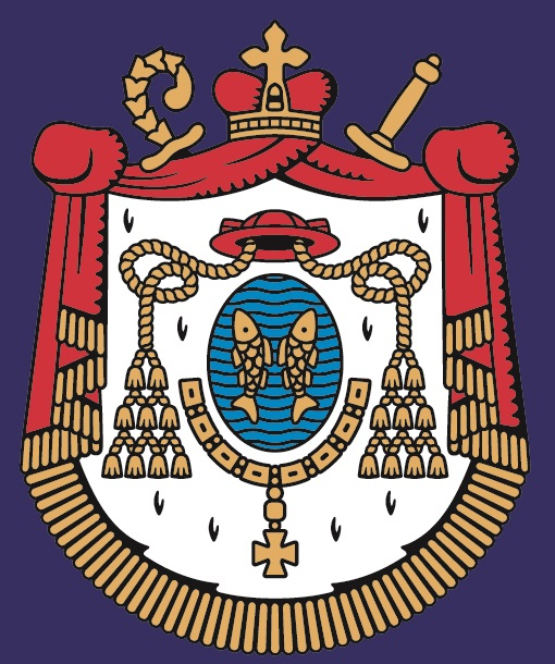 Wappen des Fürstbischofs von Gurk, Franz von Salm-Reifferscheidt (1749–1822), im Logo der Privatbrauerei Hirt, Kärnten, Österreich